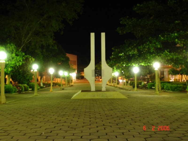 Codo praça ferreira bayma